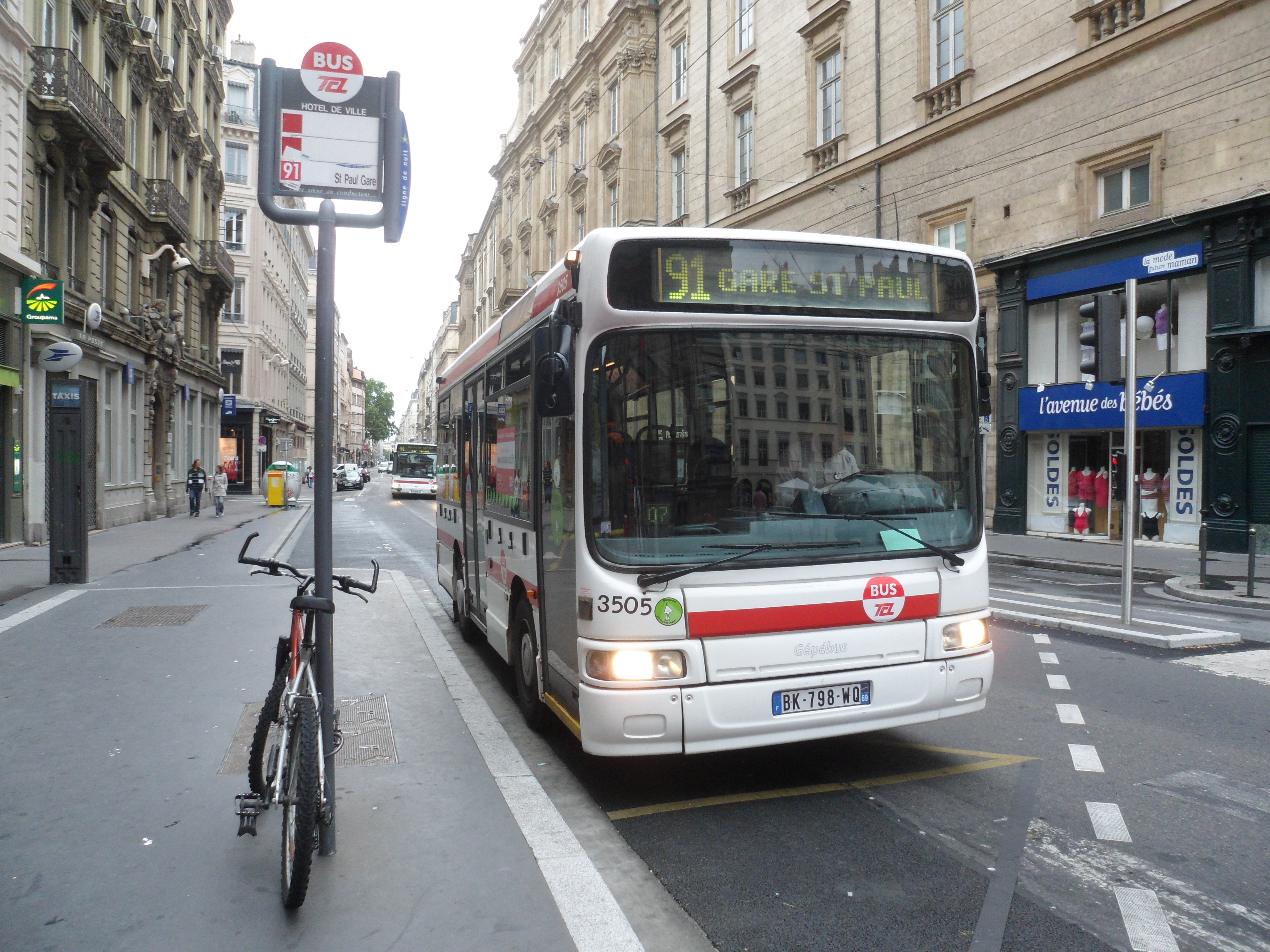 Gépébus Oréos 55 bus à Bellecour, Lyon, France.